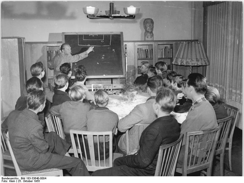 Zentralbild Klein 25.10.1955 Ein Abend im Jugendklubheim "Helmut Lehmann" in Köpenick. In der Weißkopfstraße in Köpenick wurde für alle Jugendlichen ein Klubheim eingerichtet. Jeden Abend finden sich hier die verschiedenen Zirkel zusammen, um in den gemütlichen, modernen Räumen ihren Interessen nachzugehen und in fröhlichem Beisammensein mit Musik und Tanz Entspannung zu suchen. Auch aus Westberlin kommen Jugendliche, um im Klubheim unterhaltende und belehrende Stunde zu verbringen. Das Gesetz zur Förderung der Jugend wird in vorbildlicher Weise verwirklicht, das wird wieder einmal durch die ausgezeichnete Betreuung es Klubhauses in Köpenick bewiesen, wo eine Brücke der Freundschaft zwischen Jugendlichen aus ganz Berlin geschlagen wird. UBz. Die Jugendabteilung Fußball des Sportclubs "Motor Berlin" bei der wöchentlichen Mannschaftsbesprechung und Auswertung der Spiele. Der Trainer des Sportclubs, Kollege Krüger, (an der Tafel) vermittelt dabei den Jugendfreunden seine Erfahrung.